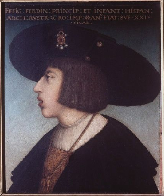 EFFIG:FERDIN:PRINCIP:ET:INFANT:HISPAN:ARCH:AVSTR:RX:RO:IMP:ANº:ETAT:SVE:XXI:VICAR